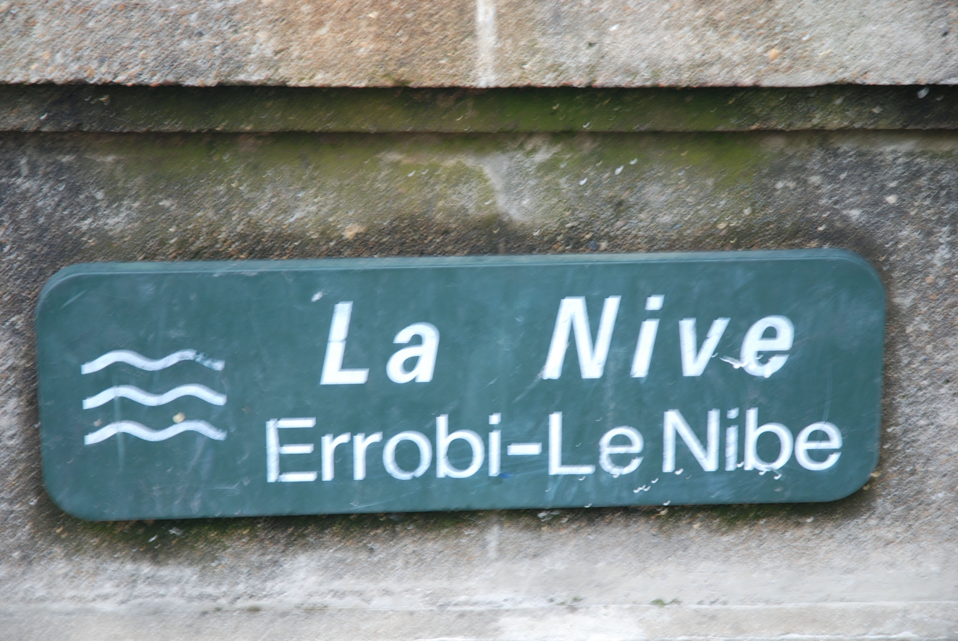 Panneau trilingue à Bayonne (français, basque, gascon)